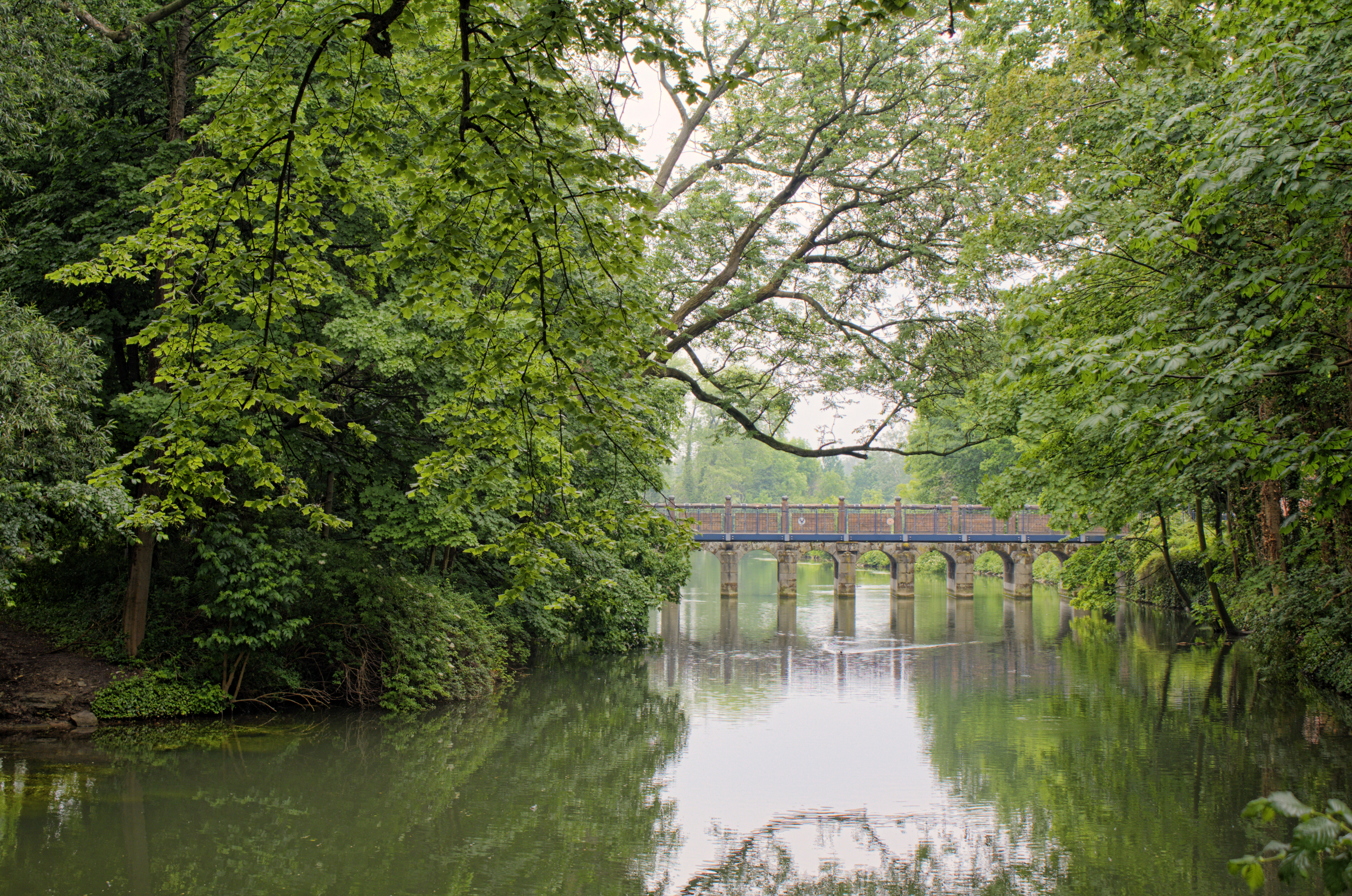 Historische Steinschleuse, Lippstadt (hinter der Wilhelmschule)This is a photograph of an architectural monument.